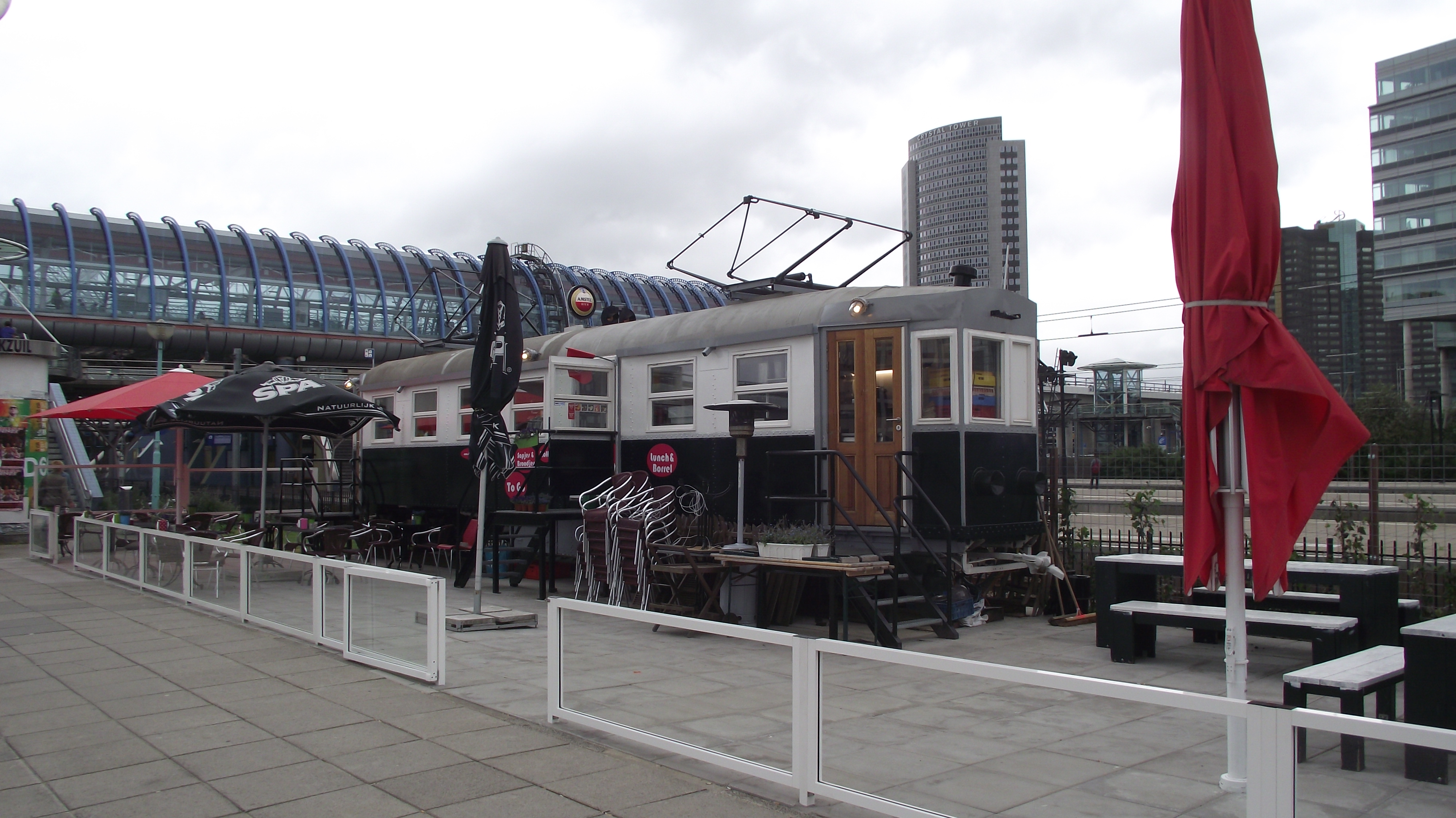 Ex Wiener lokal bahn gebruikt als café bij het station Sloterdijk